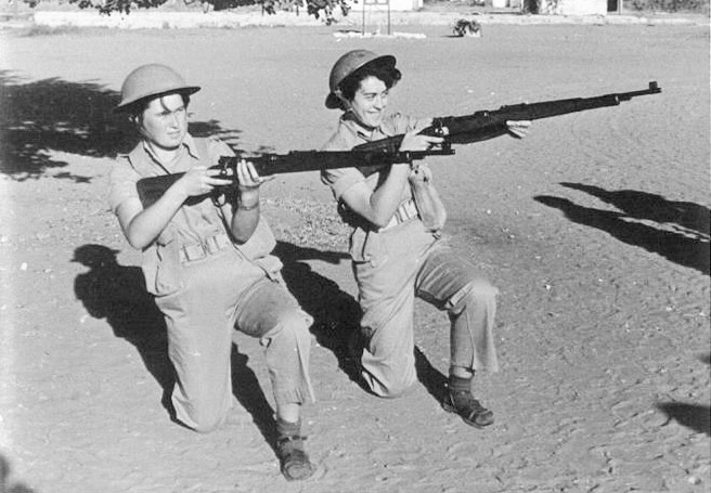 טירוניות עם רובים צ'כיים, בה"ד 12 (צריפין), אוקטובר 1954